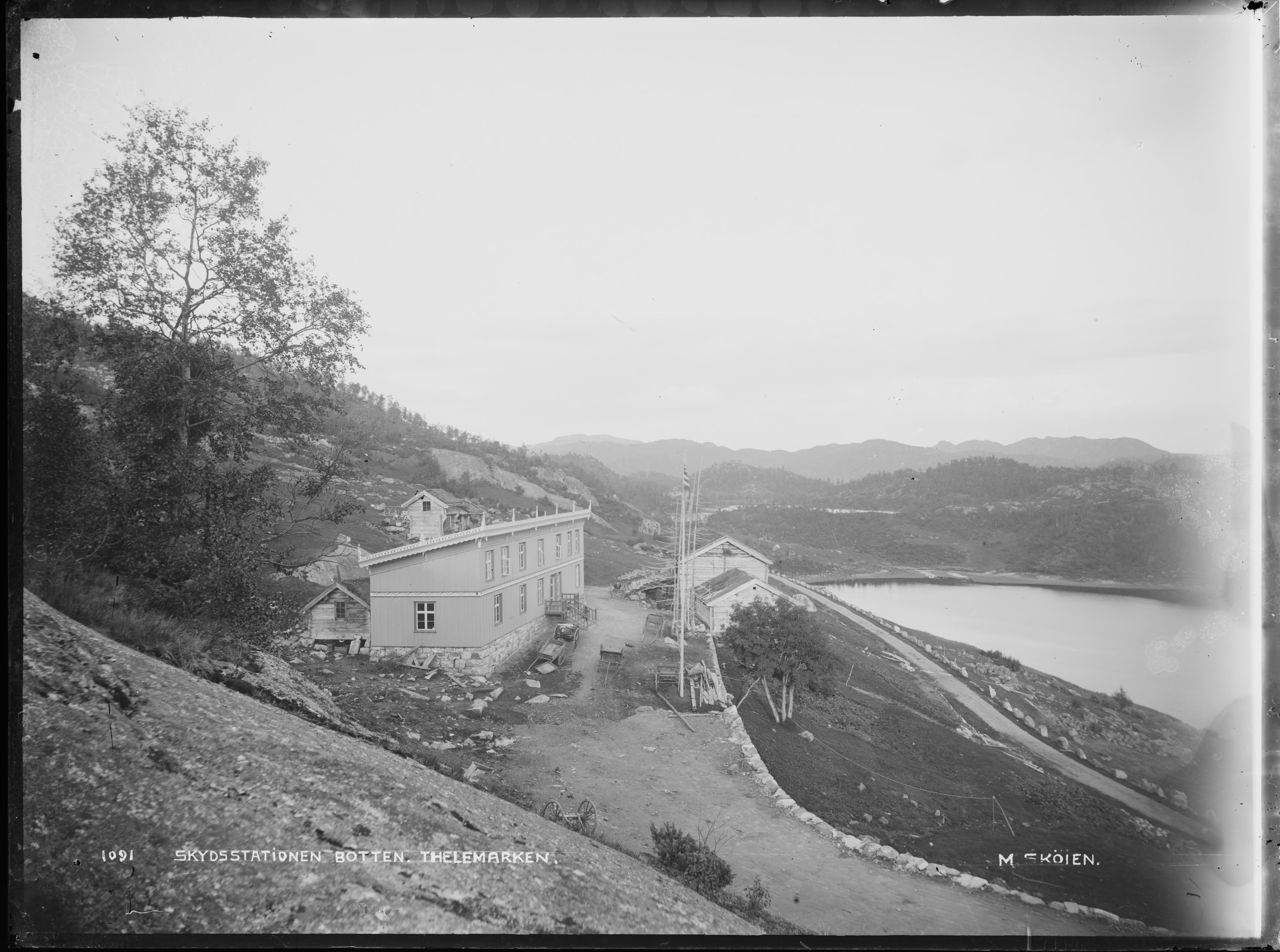 Påskrift negativ: 1091 Skydsstationen Botten Thelemarken M. Skøien Påskrift konvolutt: B176 Skysstasjon Botten, Telemark [Riksantikvaren] Sted: Botten Kommune: Vinje Fylke: Telemark Tagger: landskap Botten skysstasjon